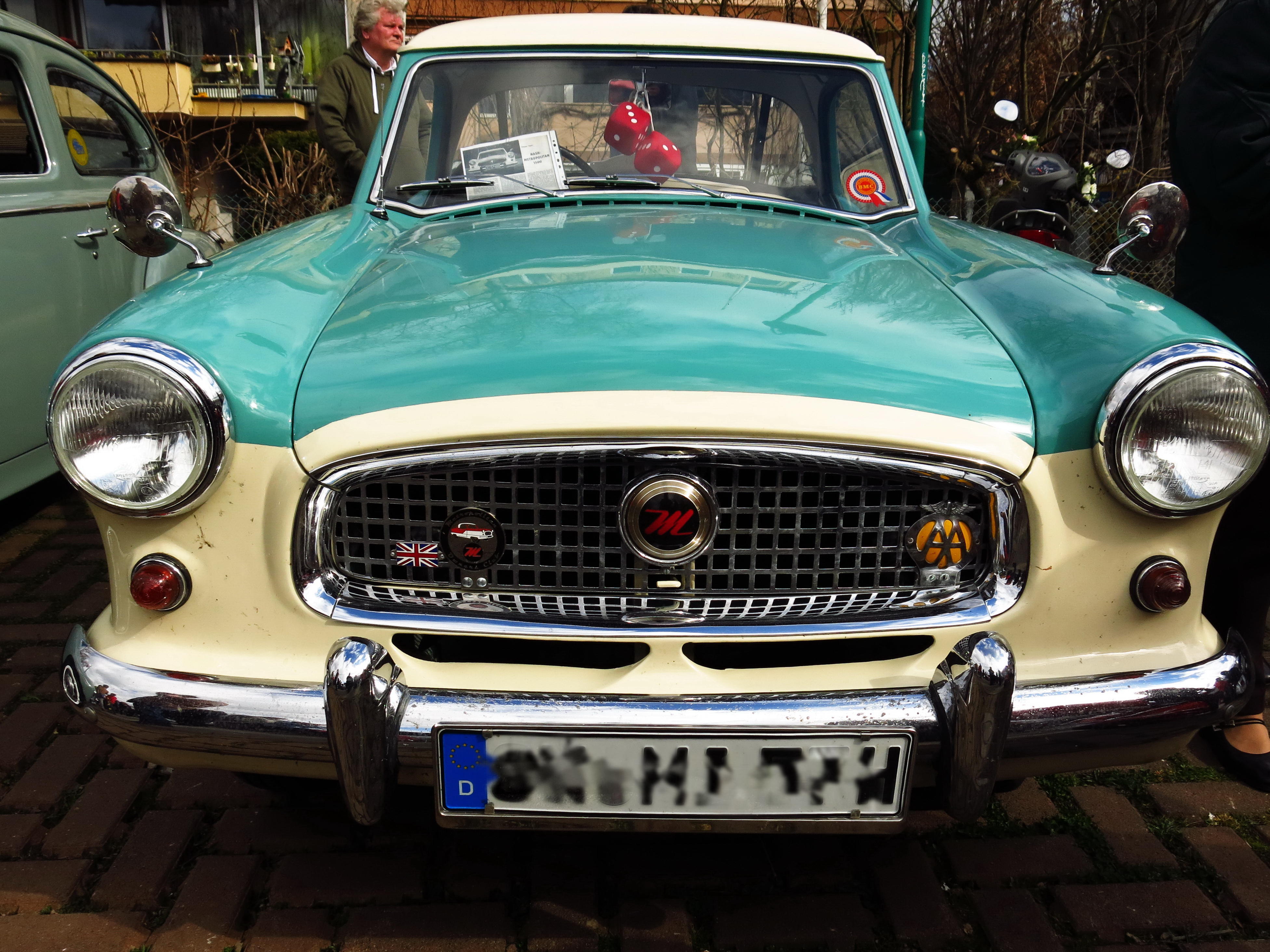 Nash Metropolitan beim Oldtimertreffen "Beuel Classics" 2015 in Beuel.